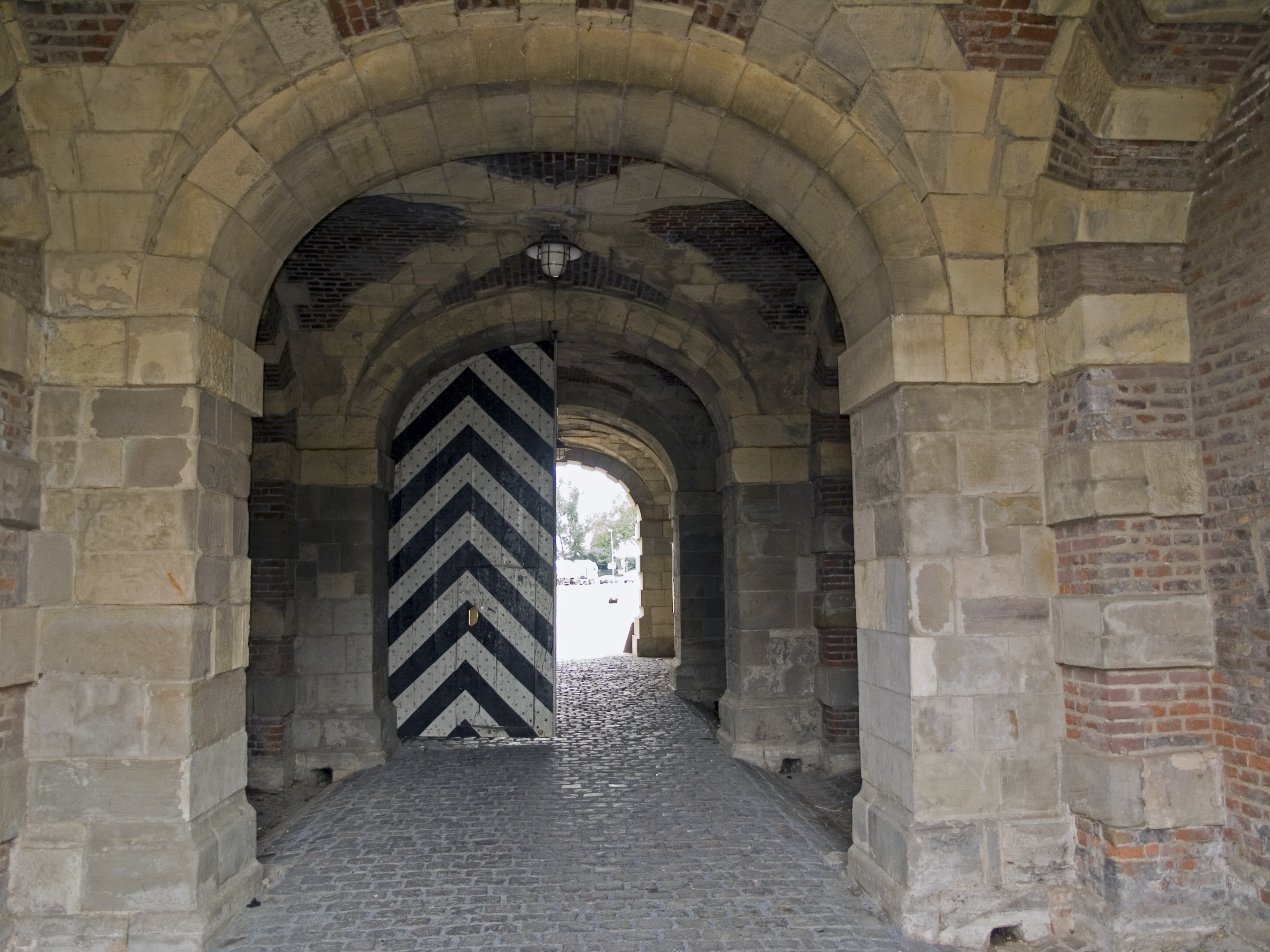 Северный Рейн-Вестфалия, Везель - Берлинские ворота